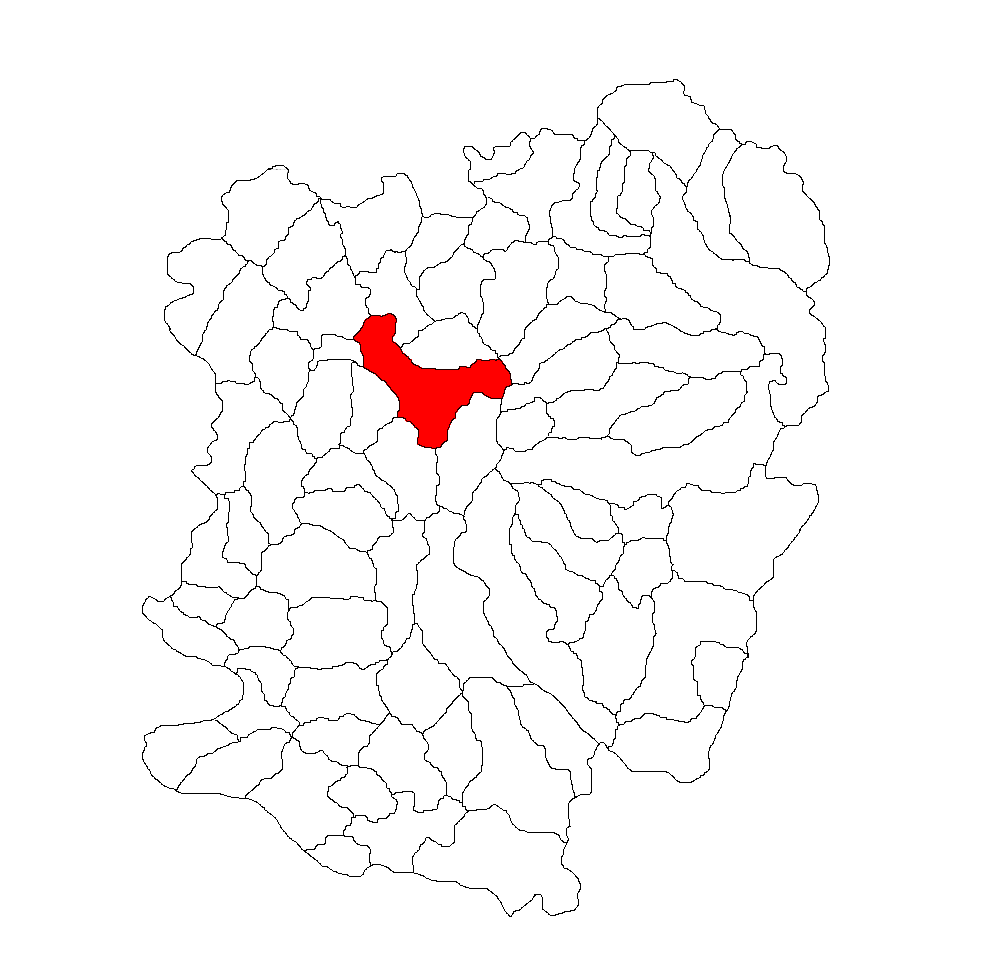 Categorie:Hărţi ale judeţului Caraş-Severin